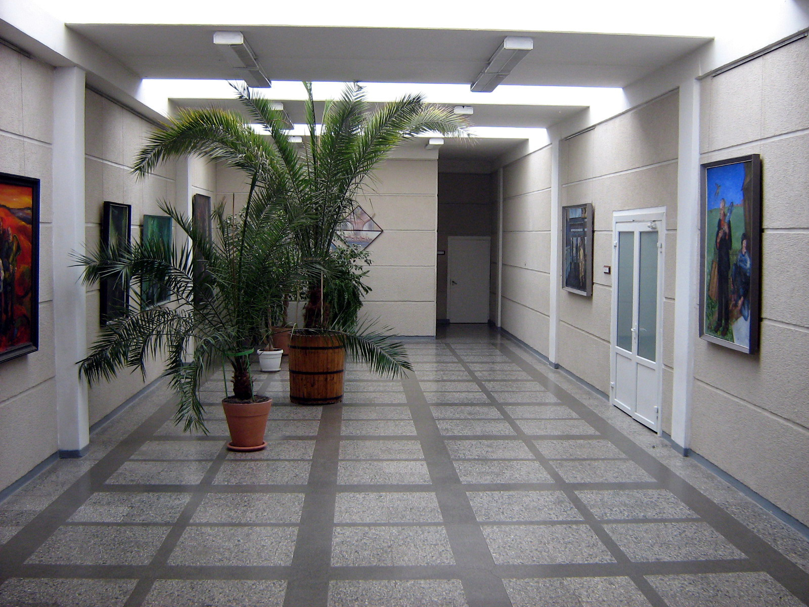 Šiaulių Romuvos pagrindinė mokykla, interjeras Foto: Algirdas, 2007 m. gegužės 25 d., Lietuva